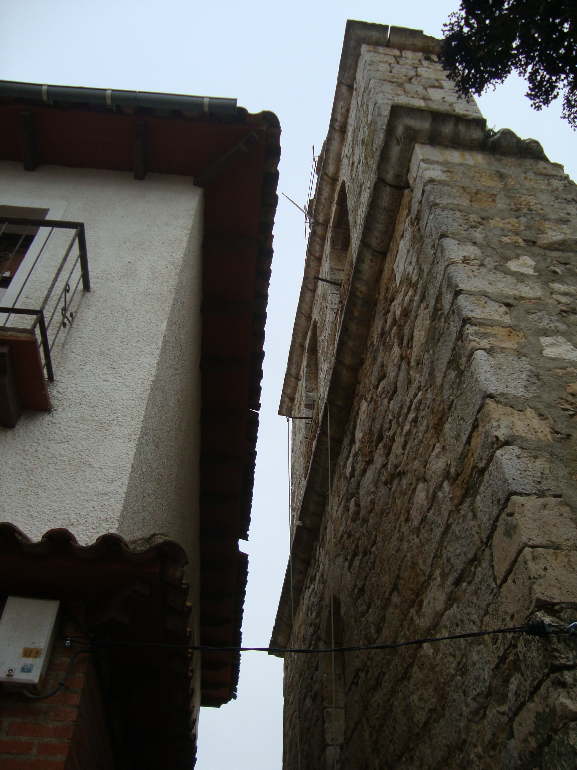 La iglesia parroquial de San Miguel Arcángel, en Villán de Tordesillas (Valladolid), moderna adosada a una espadaña de sillería anterior. La espadaña dista menos de dos metros de la casa inmediata.